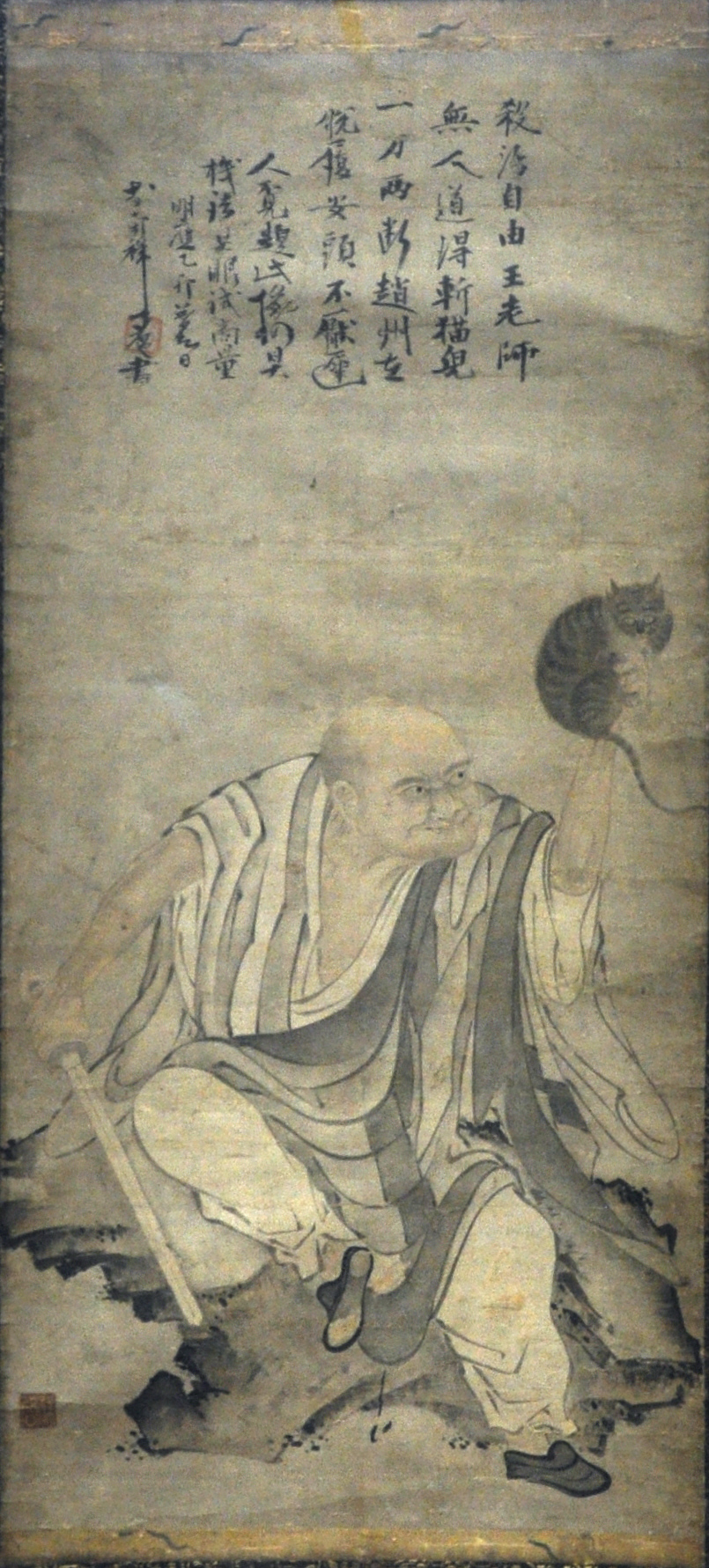 Nansen zanbyo. Der ehrwürdige Nansen (Nánquán Pǔyuàn, Nanchuan, 南泉普願) tötet eine Katze. Tusche auf Papier. Datiert 1495. Museum Rietberg, Zürich; Geschenk Julius Mueller; Inv. Nr. RJP 438